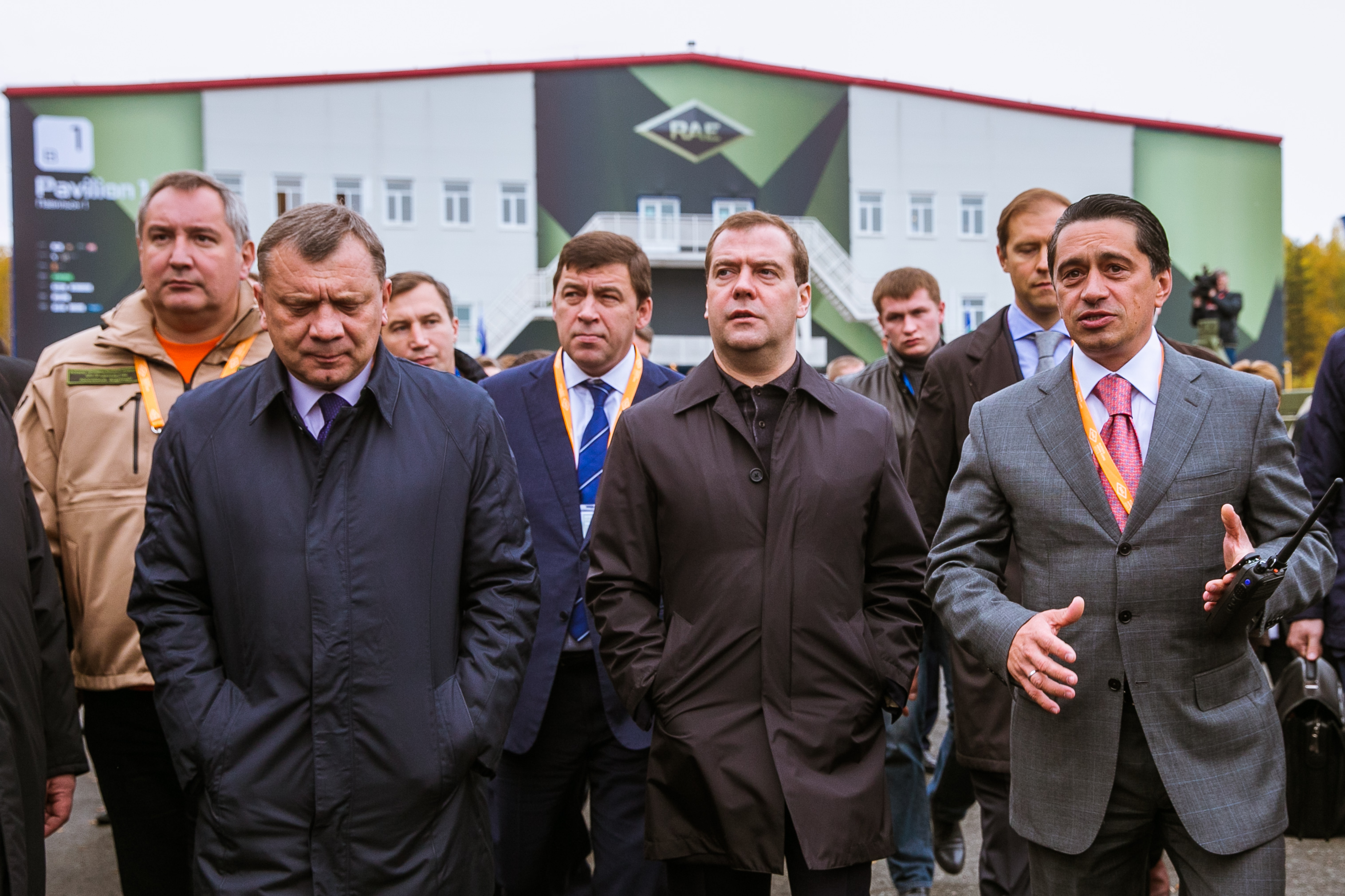 Дмитрий Медведев на выставке RAE 2013 (26 сентября 2013 года)